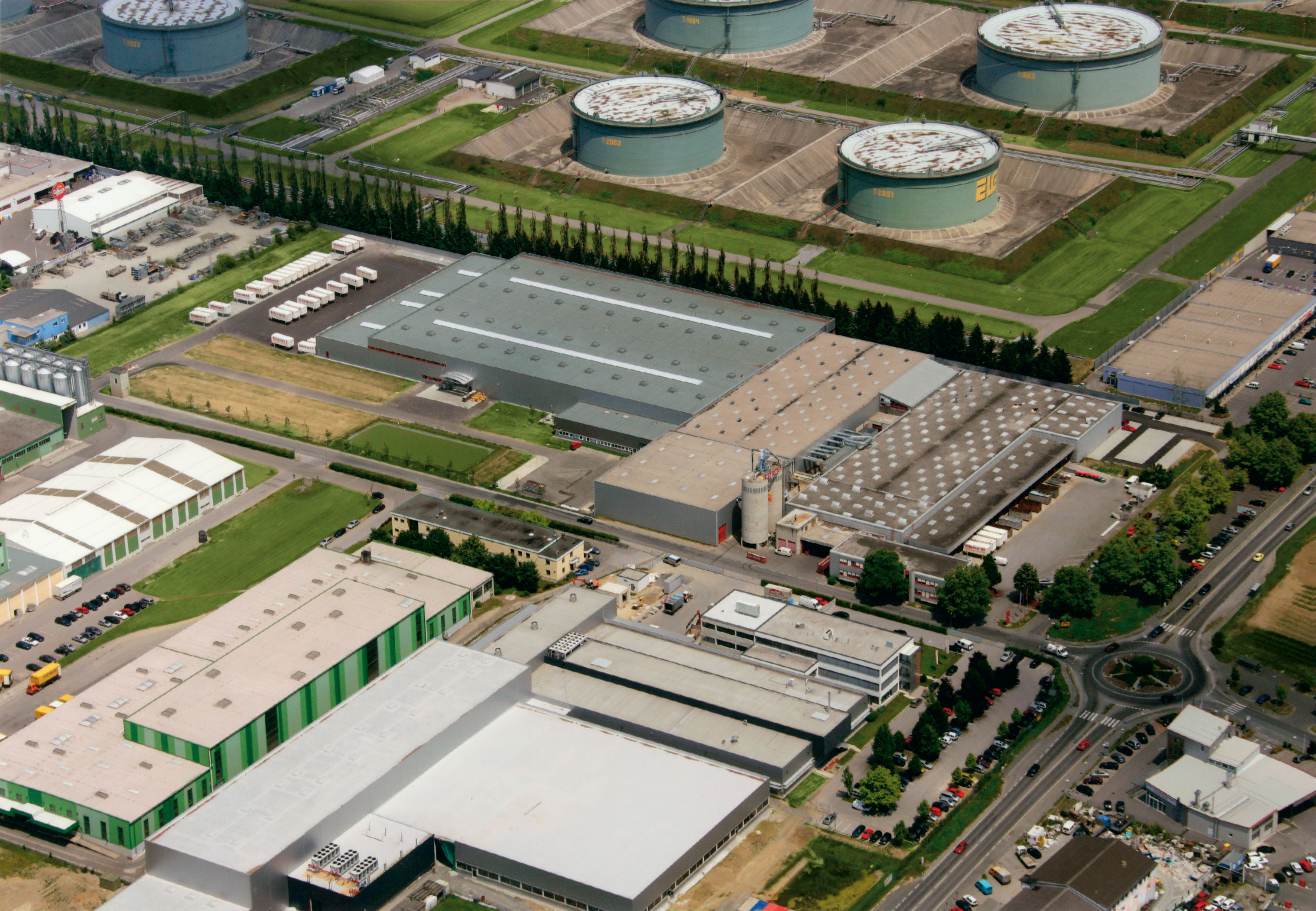 Usine de Lannach - Internorm